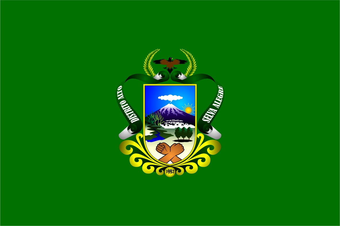 Distrito de Alto Selva alegre